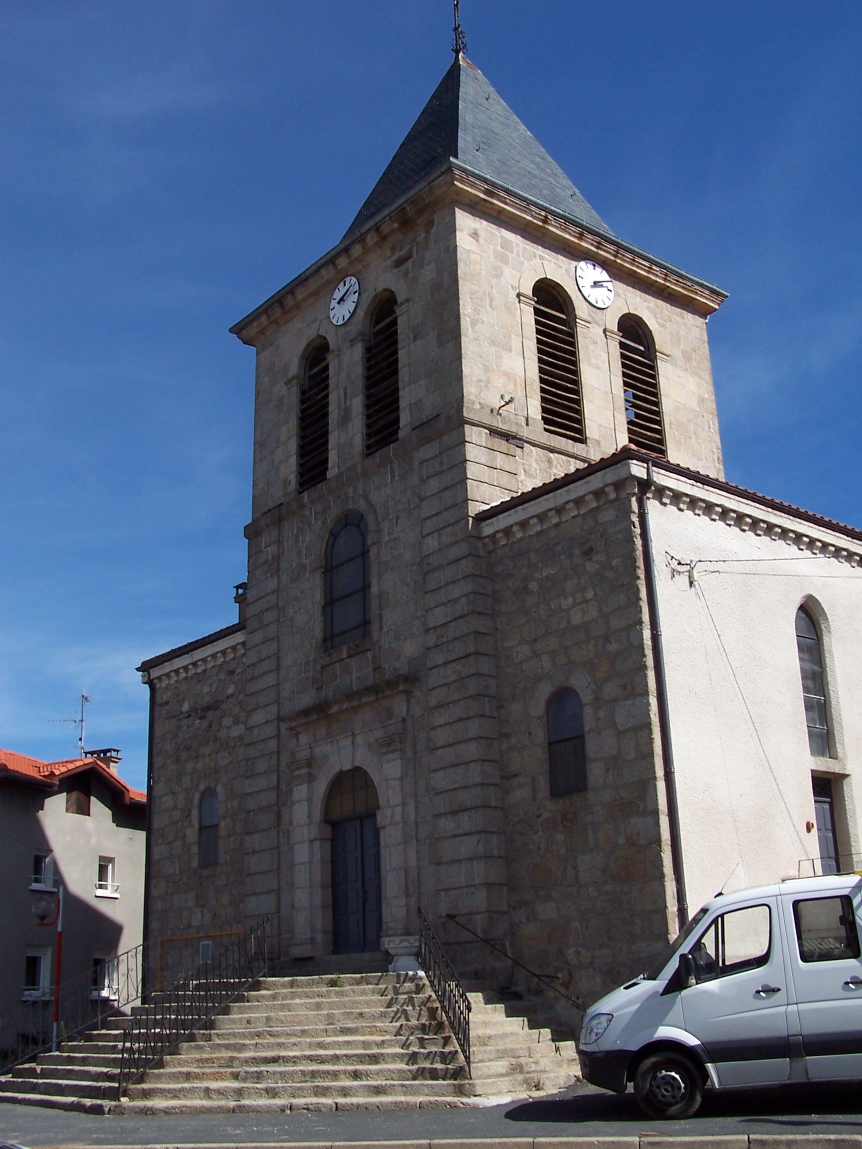 Église Saint-Maurice, à Saint-Maurice-de-Lignon en Haute-Loire, France.